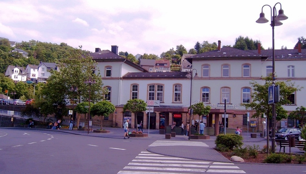 Idar-Oberstein Bahnhofsgebäude